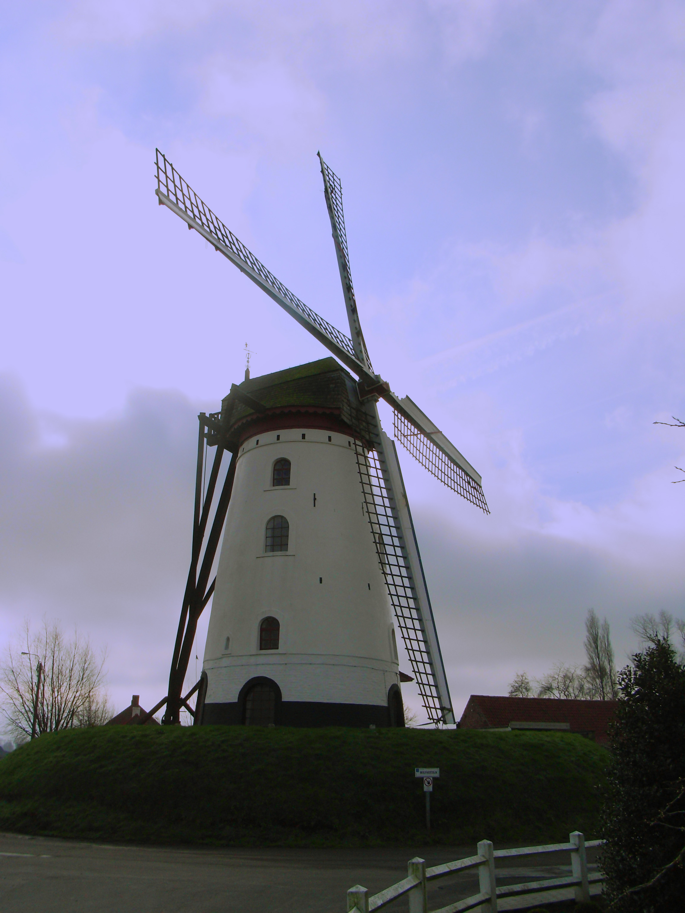 Hovaeremolen in Koekelare, Belgium.